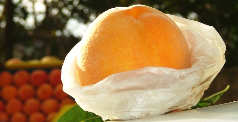 Foto della pesca tardiva di Leonforte,marchio IGP